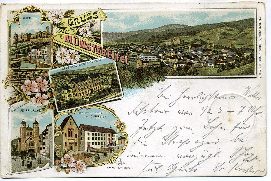 Burgruine -Pfarrkirche-Erzbischöfliches Convict -Jesuitenkirche mit Gymnasium